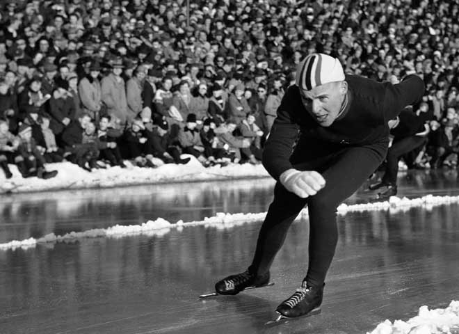 KNUT JOHANNESSEN: Vant 10 000-meteren i Squaw Valley i 1960 og 5000-meteren i Innsbruck fire år seinere.